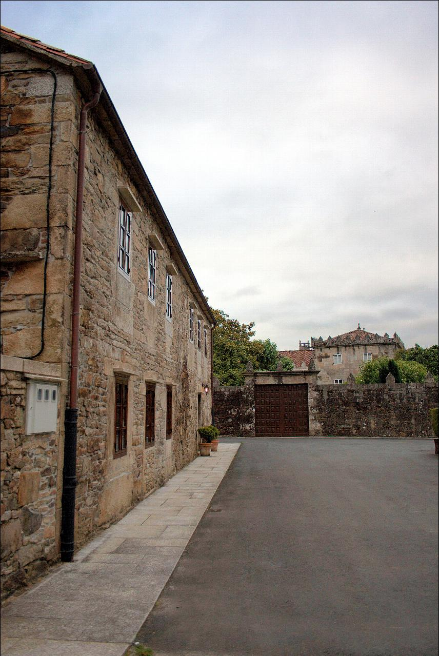 gl: Pazo de Romelle, Zas, A Coruña